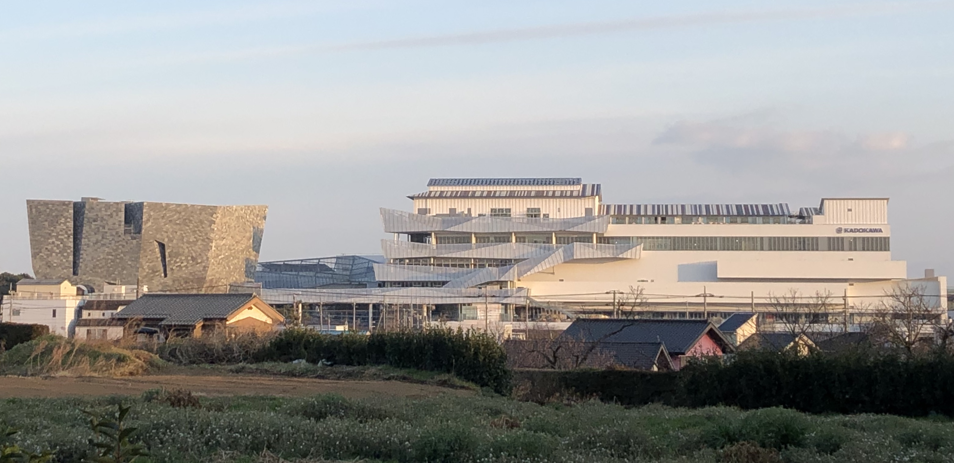 ところざわサクラタウンは、KADOKAWAの文化複合施設。202年7月に開業予定。